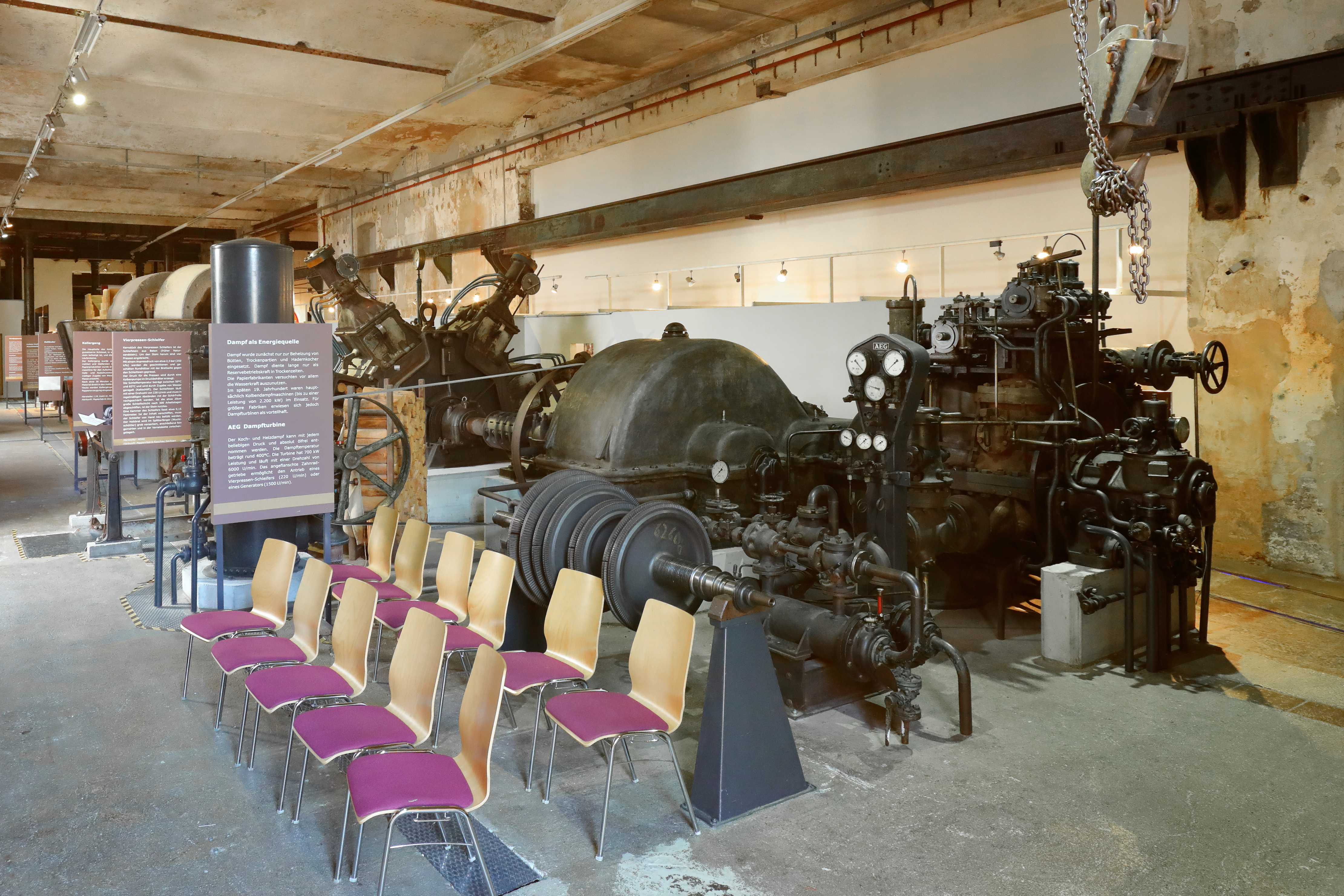 Einer der Ausstellungsräume im Papiermachermuseum in Steyrermühl, ein Ortsteil der oberösterreichischen Stadtgemeinde Laakirchen.Im Vordergrund des Ausstellungsraumes wird eine AEG-Dampfturbine gezeigt (700 kW Leistung, 6.000 U/min), inklusive einem Zahnradgetriebe, das die Verbindung zu einem Vierpressen-Schleifer (220 U/min) und einem Generator (1.500 U/min) herstellt. Das Papiermachermuseum wurde 1997 gegründet und ist in einem alten Fabriksgebäude, in dem von 1868 bis 1988 Papier und Zellulose produziert wurden, situiert. In das Papiermachermuseum sind noch ein Druckerei- und ein Feuerwehrmuseum integriert.